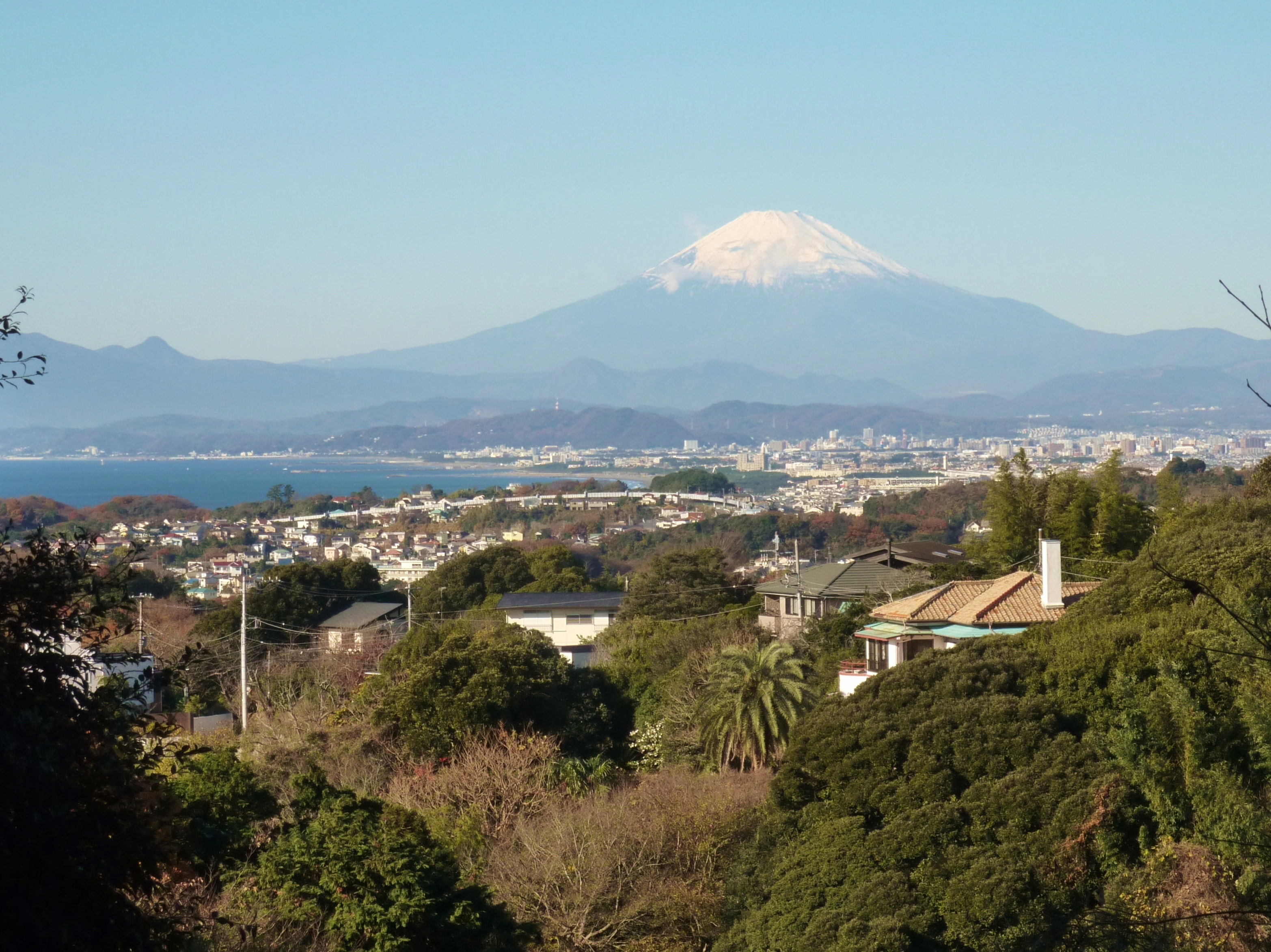 鎌倉山から見た富士山（神奈川県鎌倉市）